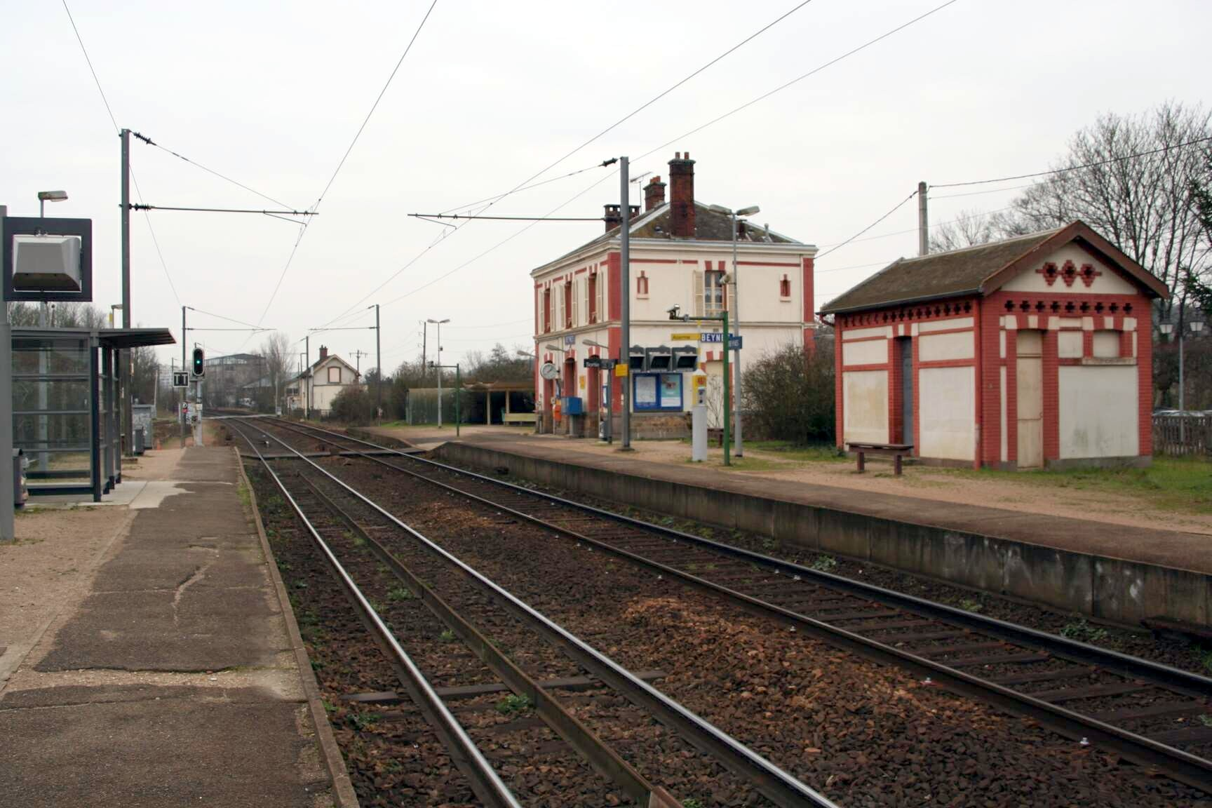 Gare de Beynes - Yvelines (France).